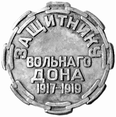 Медаль Всевеликого войска Донского: Защитнику вольного Дона 1917-1919 (реверс)